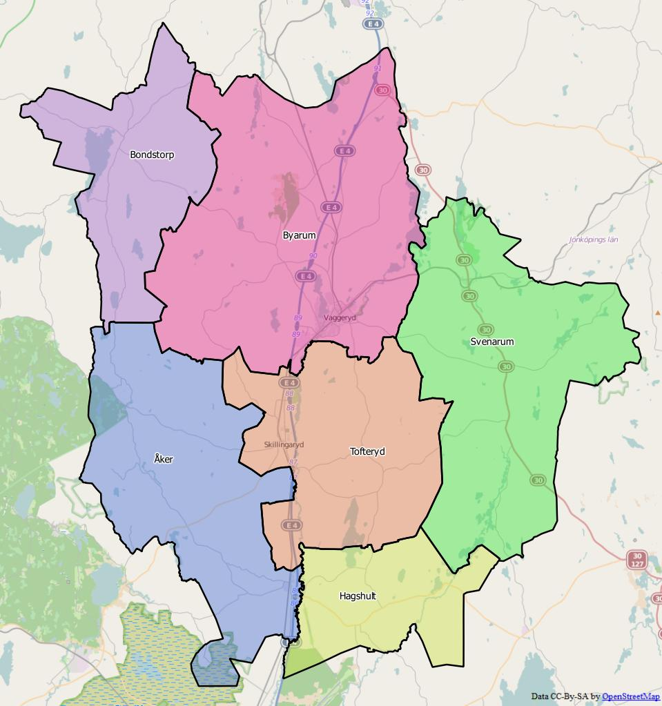 Distriktsindelningen i Vaggeryds kommun World file: 77.71271666008632906 0 0 -77.71271666008632906 1536788.2444378340151161 7898305.1658024163916707